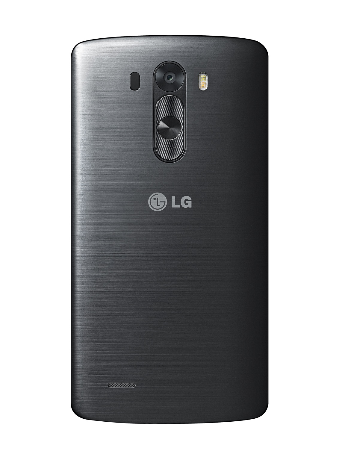 ■ 올 최대 전략 스마트폰 28일(한국시각 기준) 전 세계 동시 공개 □ 세계 6개 도시에서 24시간 이내 행사 완료 □ 28일 한국 출시 이어 세계 170여 통신사 순차 공급 예정 ■ ‘Simple is the New Smart’ 컨셉트 반영 □ 사용자 경험 최우선의 G시리즈 철학 계승 ■ 글로벌 런칭 첫 쿼드HD 스마트폰 □ 쿼드HD(2,560x1,440) IPS 디스플레이 탑재 □ 538ppi 초고해상도 구현… HD의 4배, 풀HD의 2배 ■ 레이저 오토 포커스로 빠르게 초점 잡는 카메라 □ 후면에서 레이저 빔 쏘아 피사체와의 거리를 초고속으로 측정 □ 어두운 곳에서도 선명하게 찍히는 전면 카메라 □ 오디오까지 배려한 비디오 레코딩 ■ 심플함을 담은 입체 디자인 □ 매끈한 일체감 느껴지는 전면 디자인에 심플한 GUI 적용 □ 후면엔 인체공학적 곡률 채택해 한 손에 들어오는 그립감 구현 □ 메탈릭 스킨 후면 커버, 더 편해진 후면키 채택 ■ 사용자를 이해하는 진정한 스마트 UX □ 빅데이터 분석해 오타 줄여주는 ‘스마트 키보드’ □ 사용 패턴 기억해 맞춤형 정보 제공하는 ‘스마트 알림이’ □ 노크 코드, 컨텐츠 잠금, 킬스위치로 강화된 ‘스마트 시큐리티’ ※ Social LG전자 에서 관련 보도자료를 확인하실 수 있습니다.